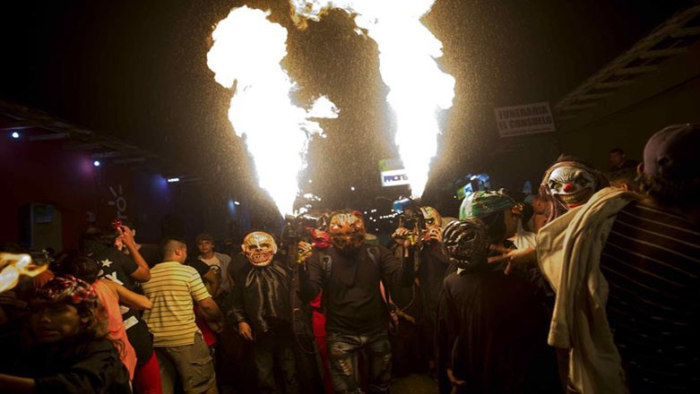 Fiesta de los Aguizotes en la Ciudad de Masaya, Nicaragua